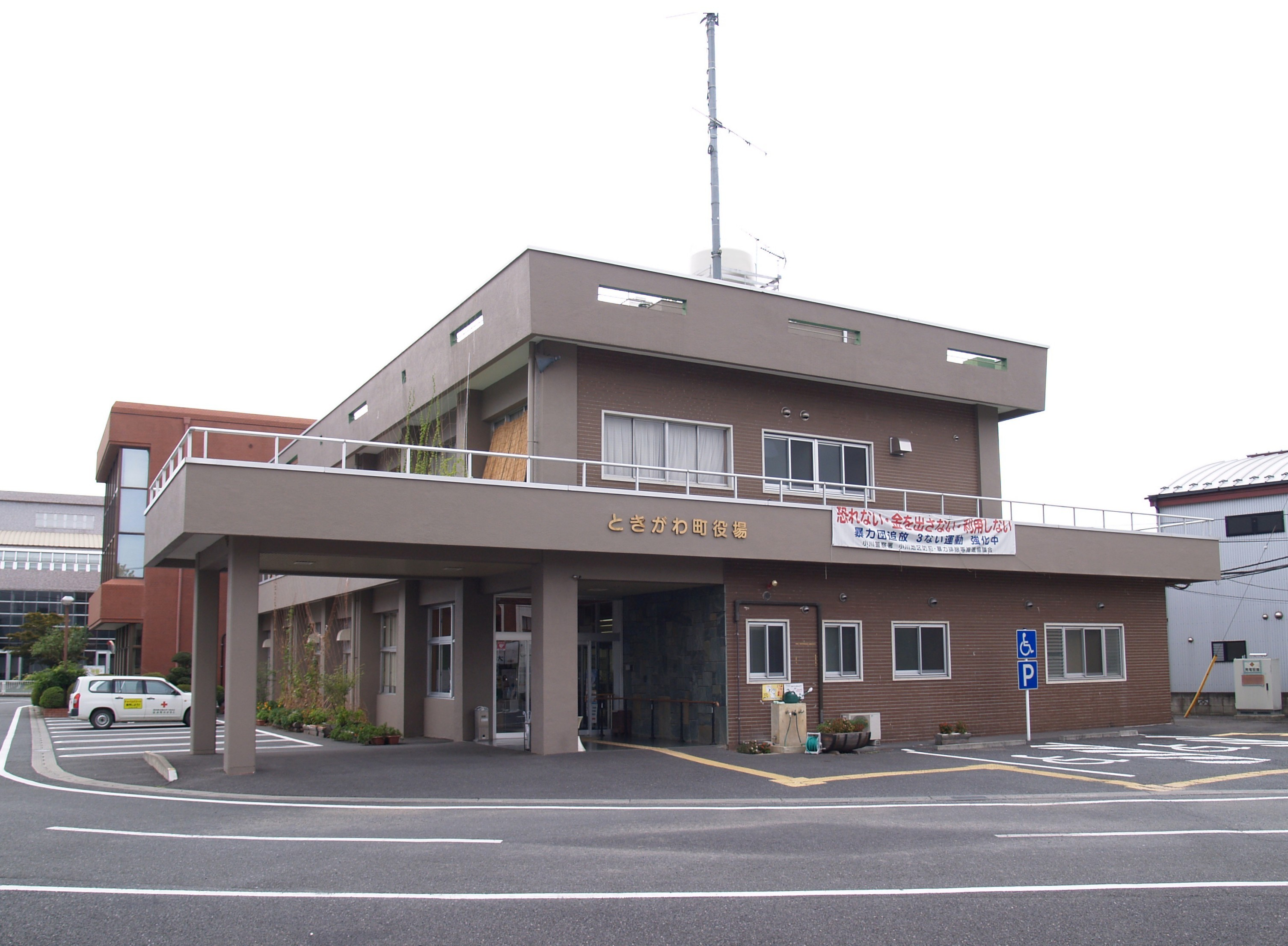 ときがわ町役場